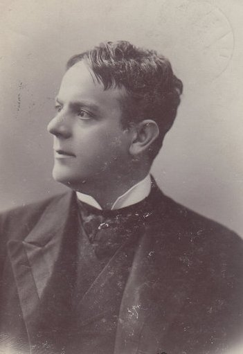 Zilahy Gyula (1859-1938) színész, színházigazgató. Postcard